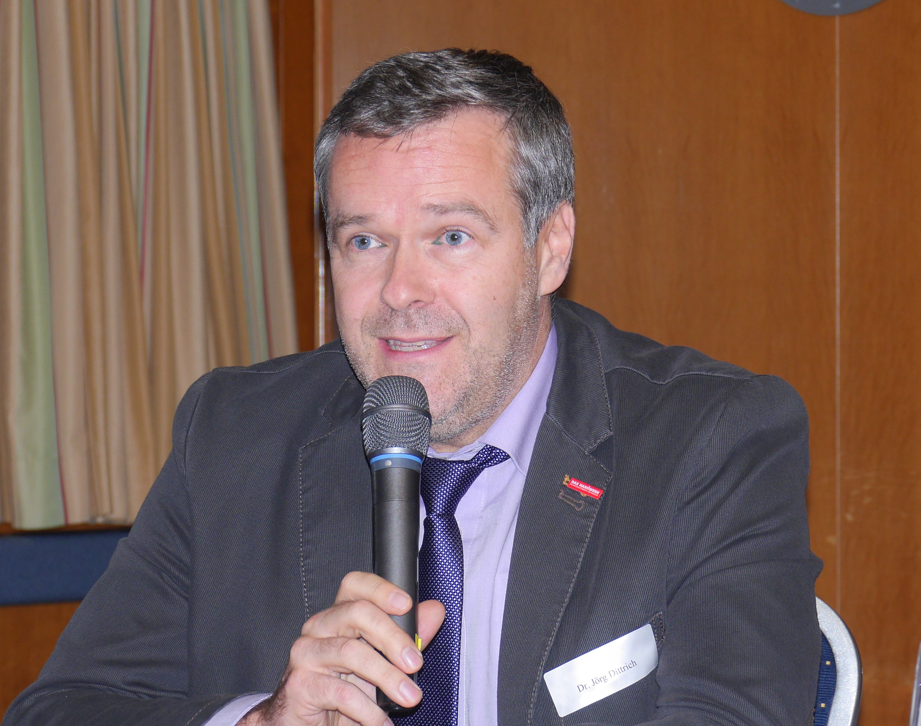 Jörg Dittrich, Präsident der Handwerkskammer Dresden